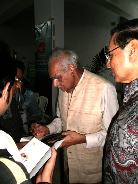 Kuldip Nayar giving autograph, Dhaka 2012